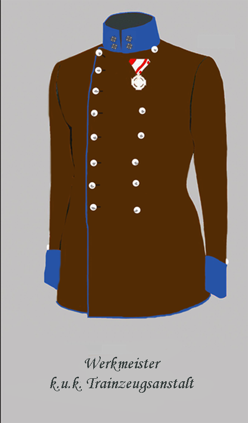 Waffenrock eines Werkmeisters (Oberleutnant) der k.u.k. Trainzeugsanstalt